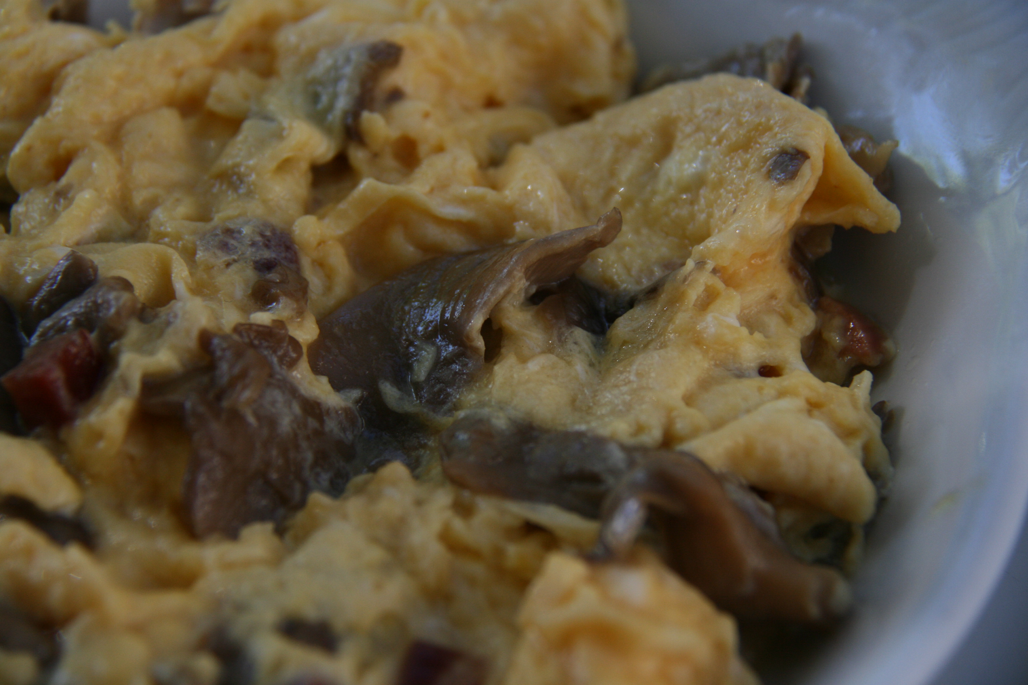 Revuelto de huevos con setas (detalle)